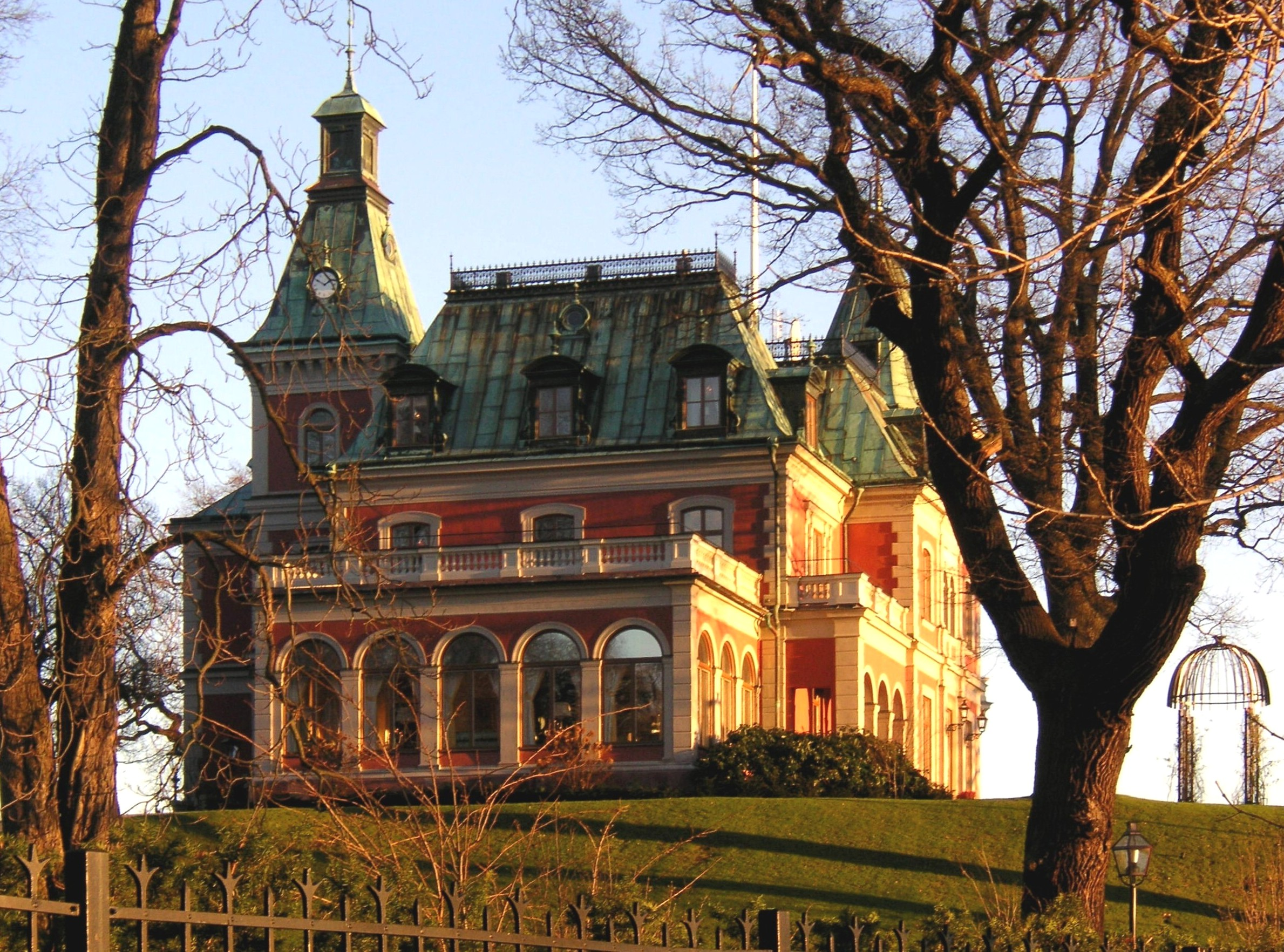 Täcka Udde på Södra Djurgården